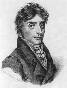 Portrait des Dichters Stephan Schütze, zeitgenössische Darstellung des 1839 verstorbenen Künstlers